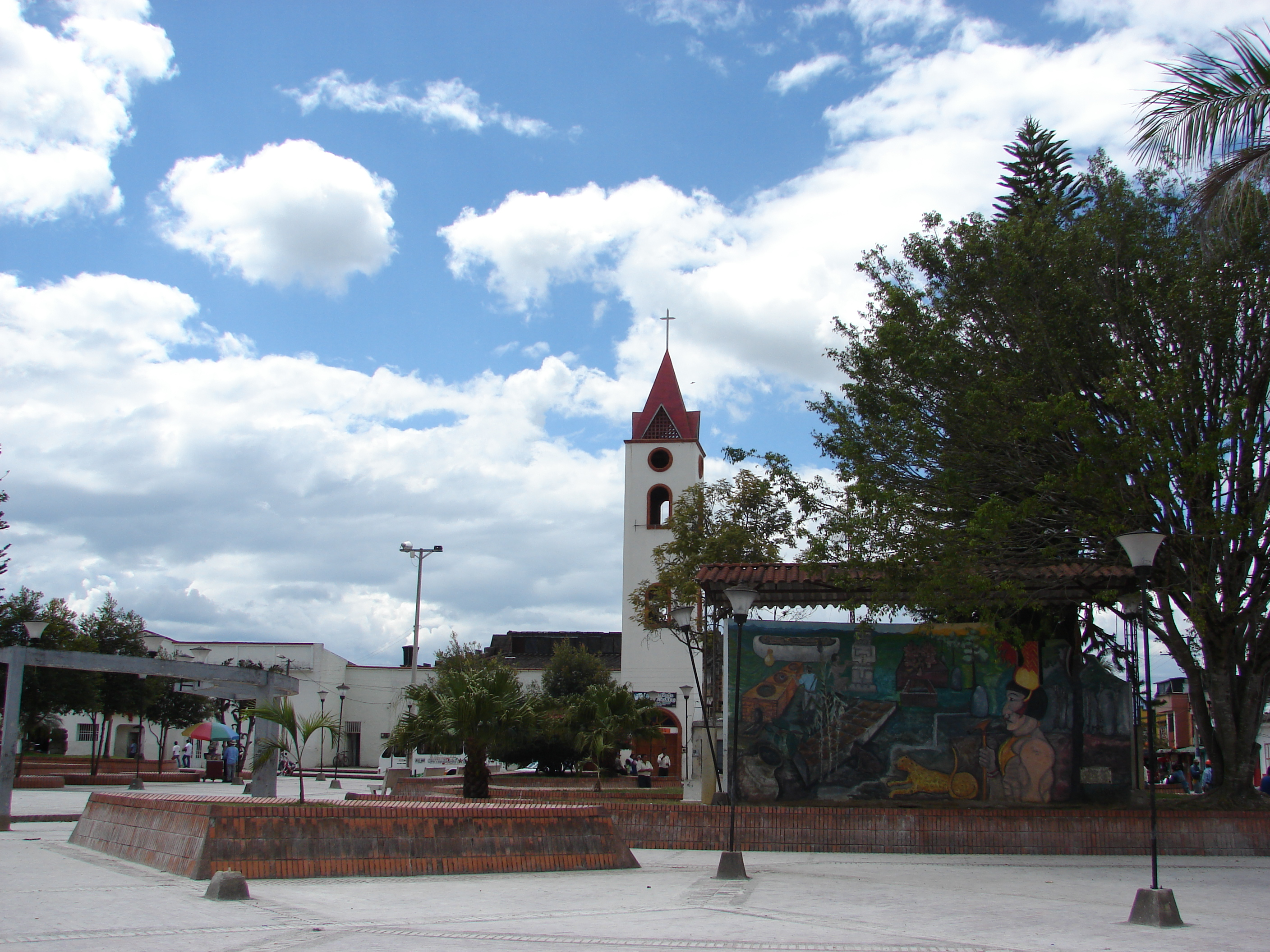 PLaza Principal Isnos-Huila. A Pulido-Villamarín